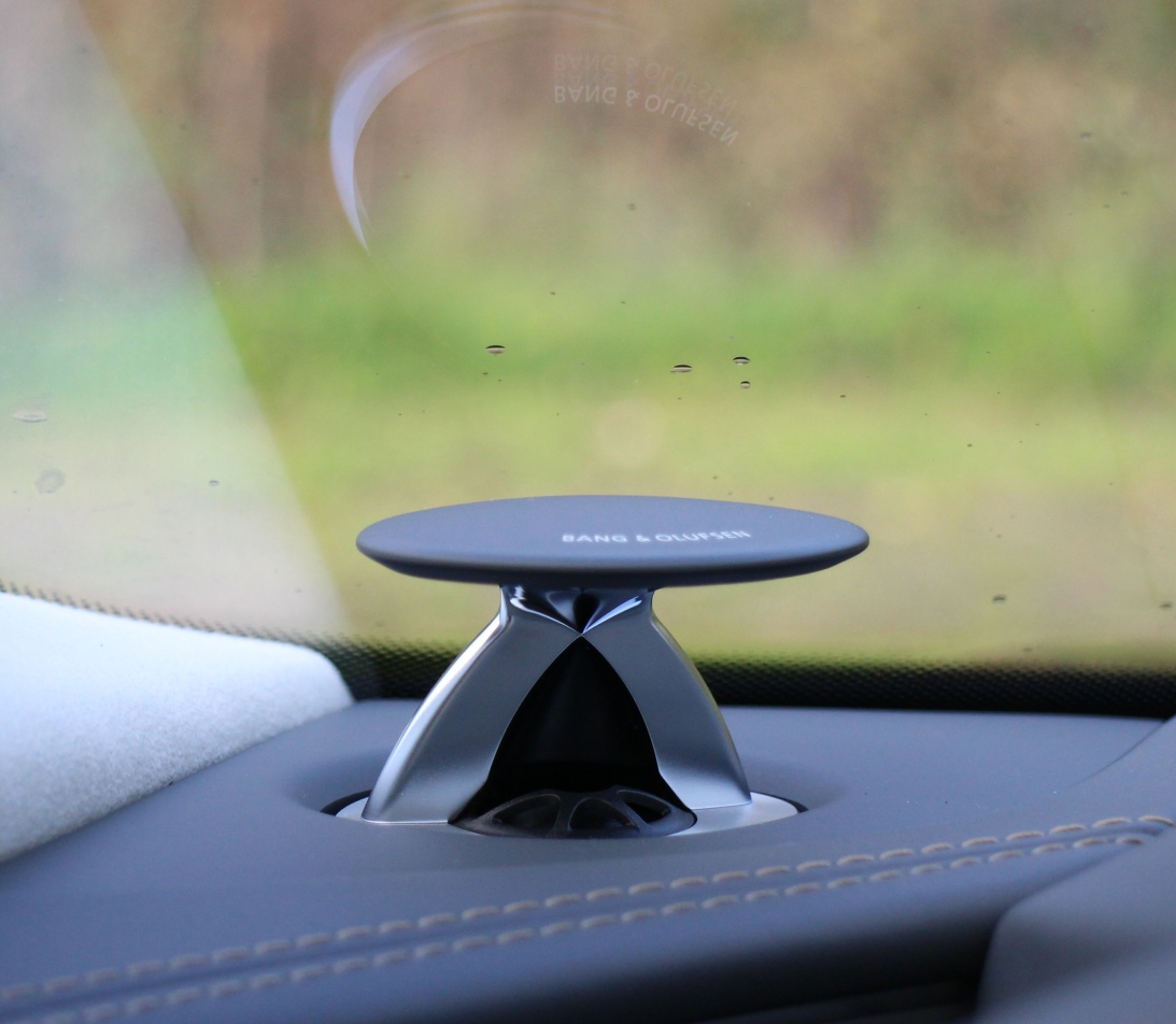 Facelift